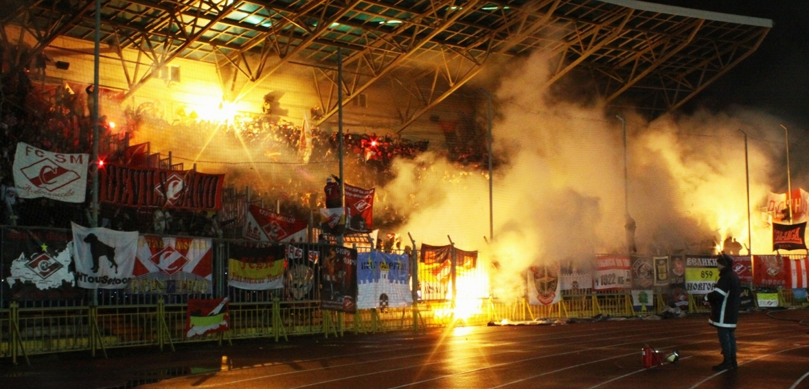 Пиротехничекое шоу на матче с "Рубином" в Казани. 2012 год